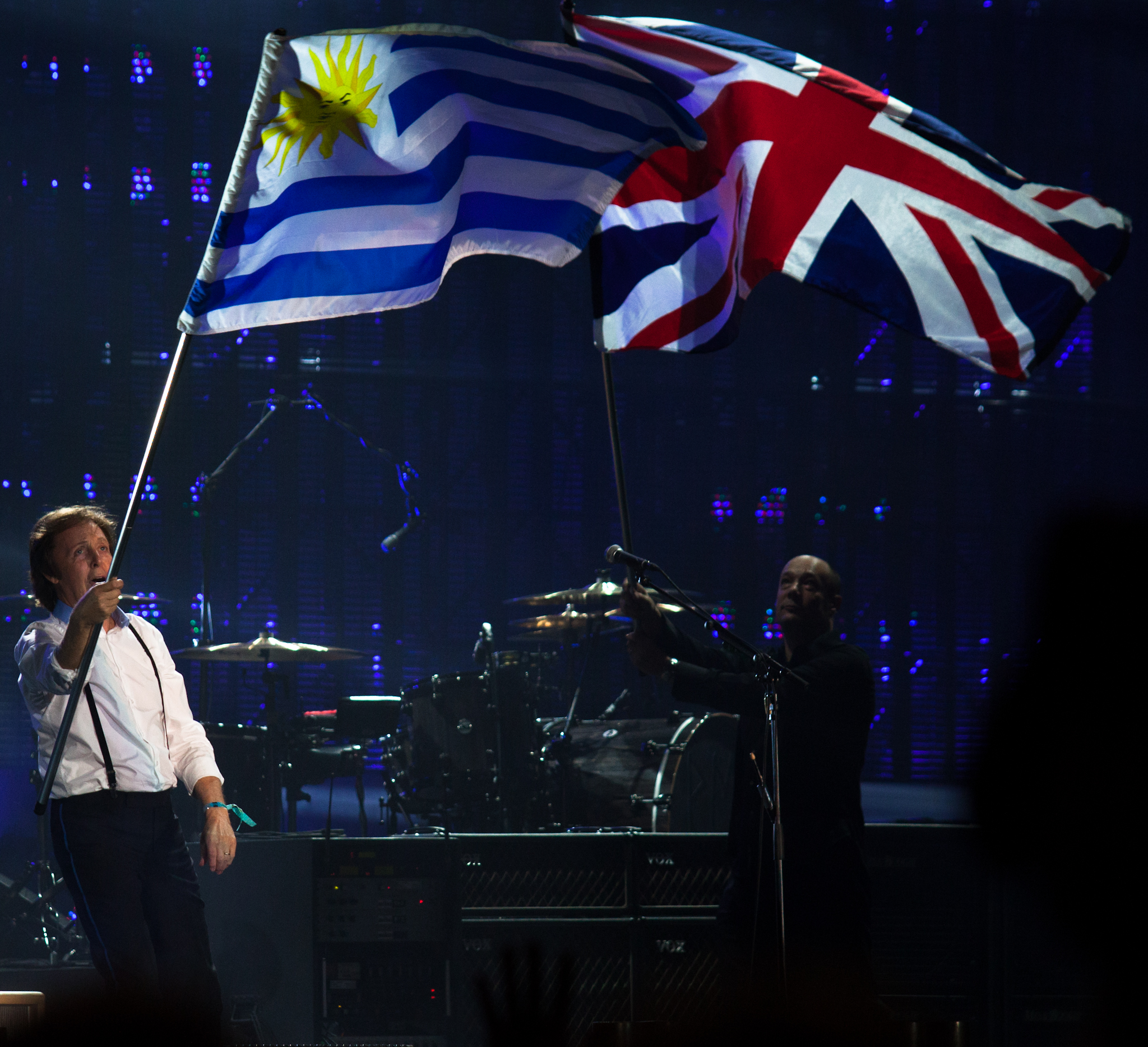 Paul and Paul 'Wix' Wickens. Estadio Centenario. Montevideo, Uruguay. Camera: Canon EOS 5D Mark II 1 ISO: 1250